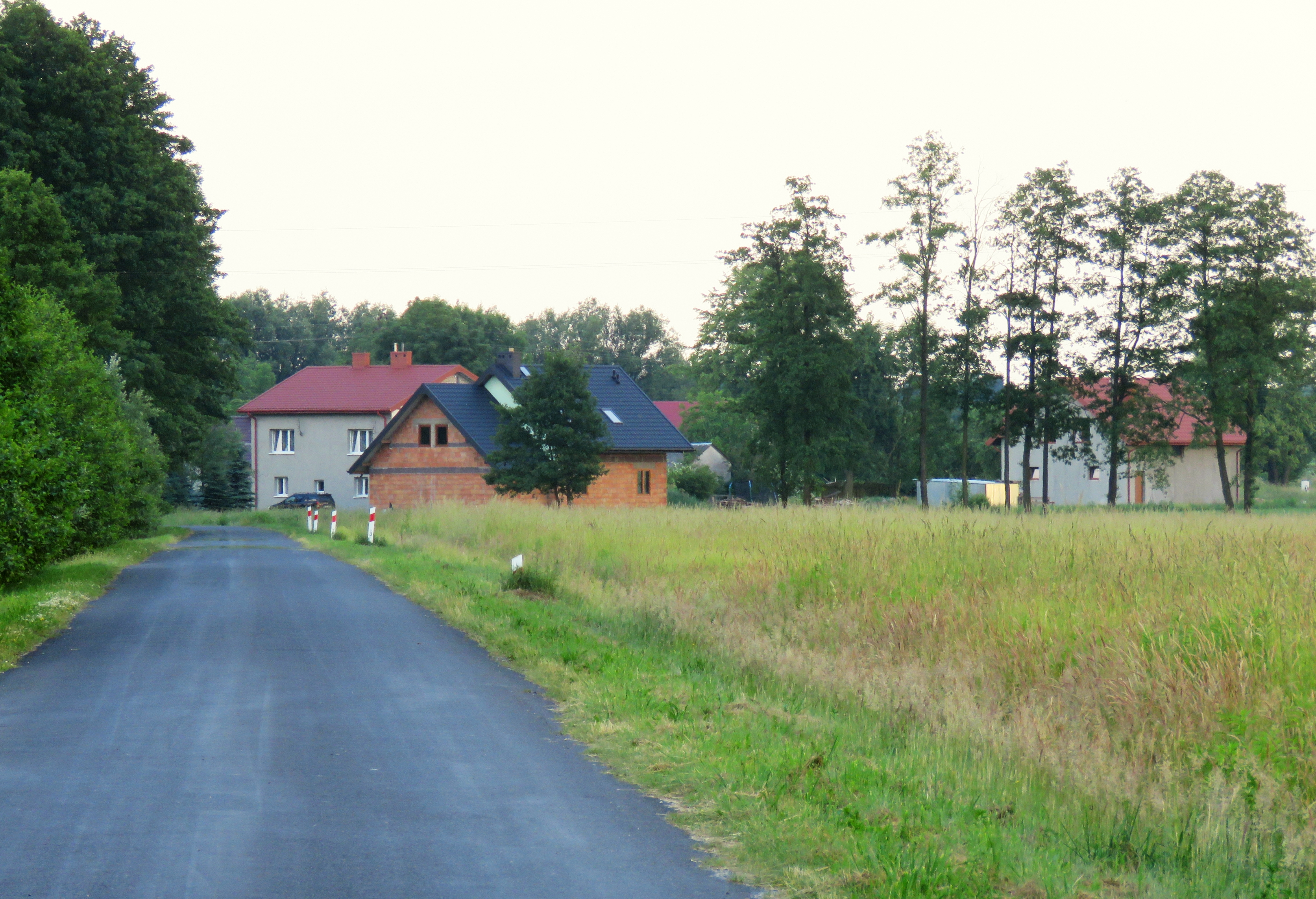 Nowy Dworek